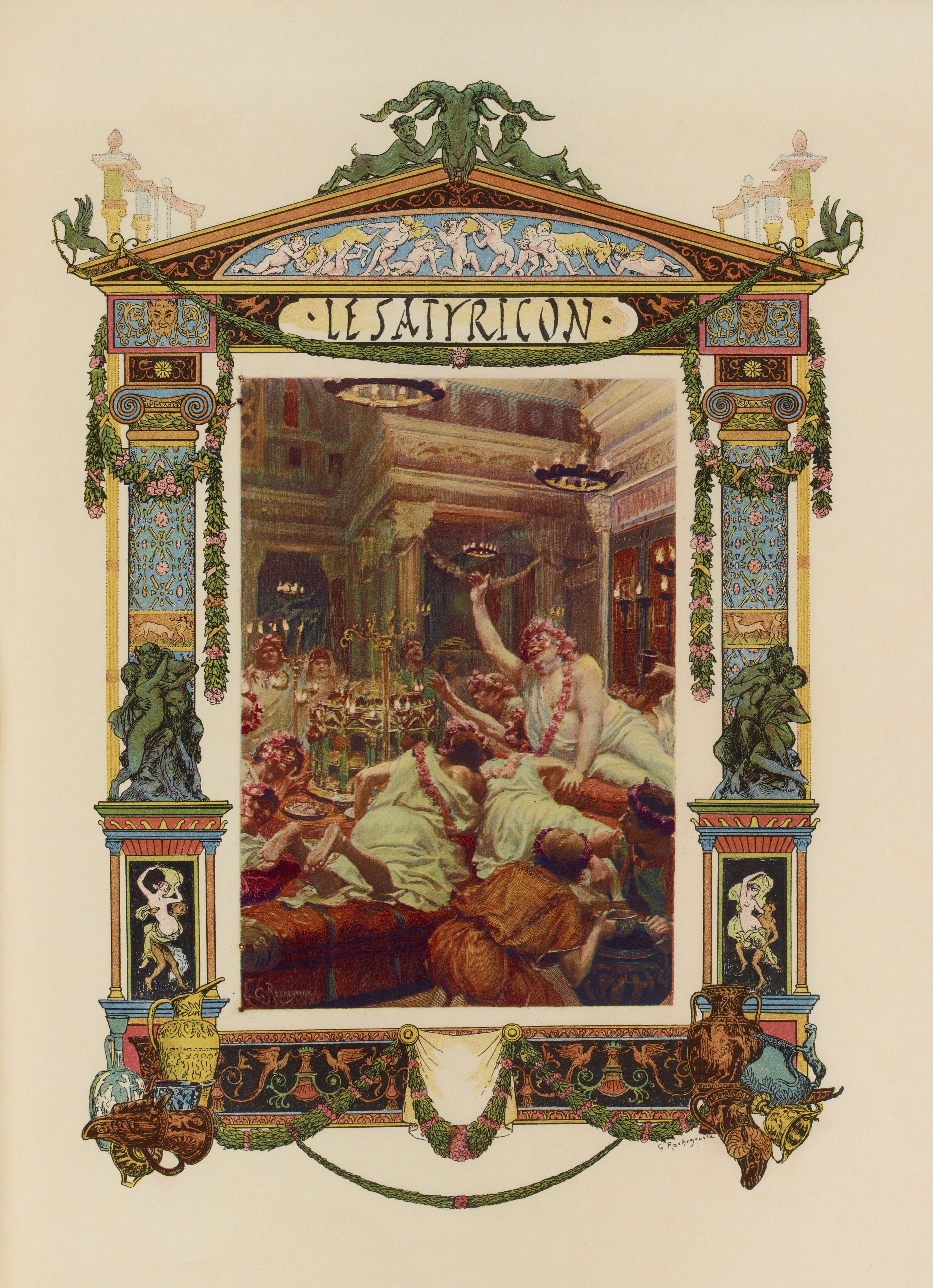 Illustration du Satyricon de Pétrone par Georges-Antoine Rochegrosse : le banquet de Trimalcion.